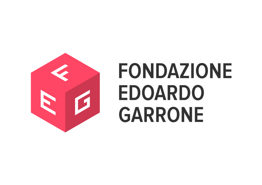 Logo Fondazione Edoardo Garrone